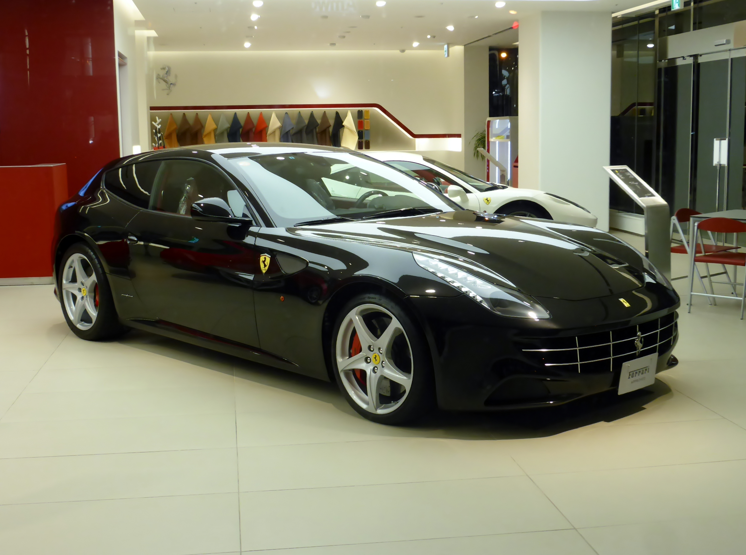 フェラーリ・FFをフロントから撮影。